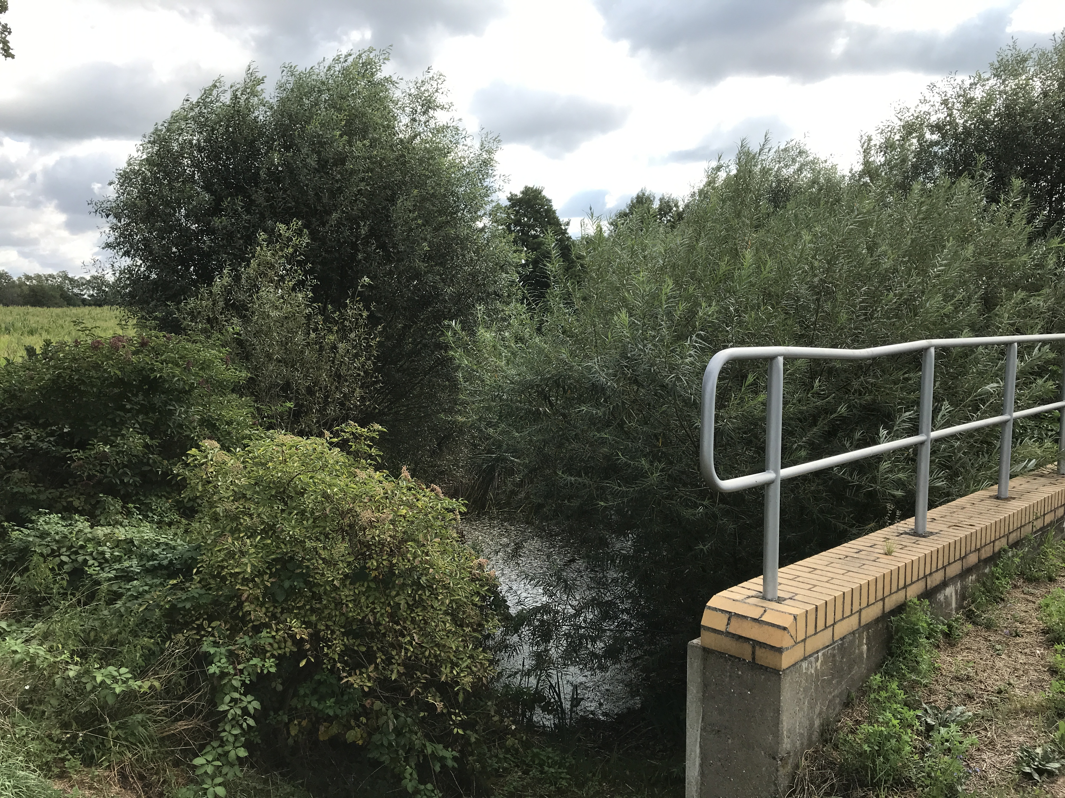 Hohe oder auch Eiserne Brücke an der Verbindungsstraße von Demnitz nach Steinhöfel im Land Brandenburg.